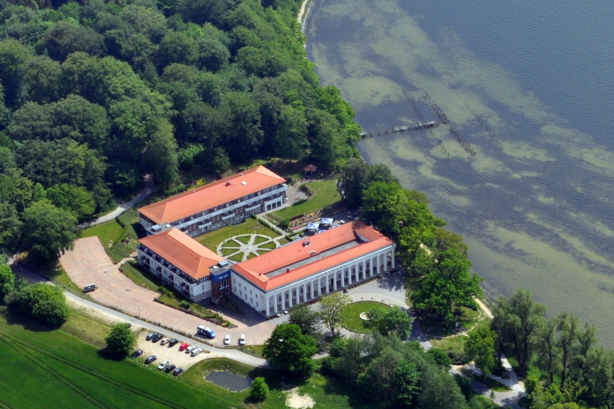 Die Bilder wurden von mir während eines einstündigen Rundflugs ab Flugplatz Güttin am 21. Mai 2011 aufgenommen. Die Bildbeschreibung steht im Dateinamen. Aufgenommen mit einer Nikon D5000 durch das Seitenfenster des Flugzeugs.